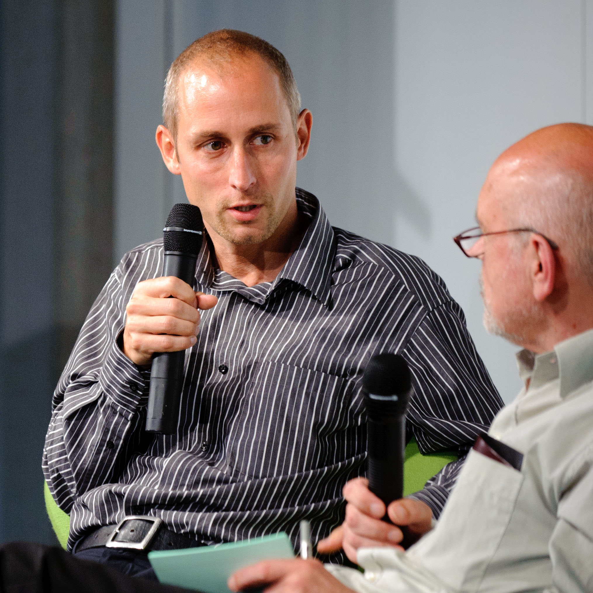 Marcus Urban (SC Sternschanze Hamburg, Autor "Versteckspieler") Foto: Stephan Röhl